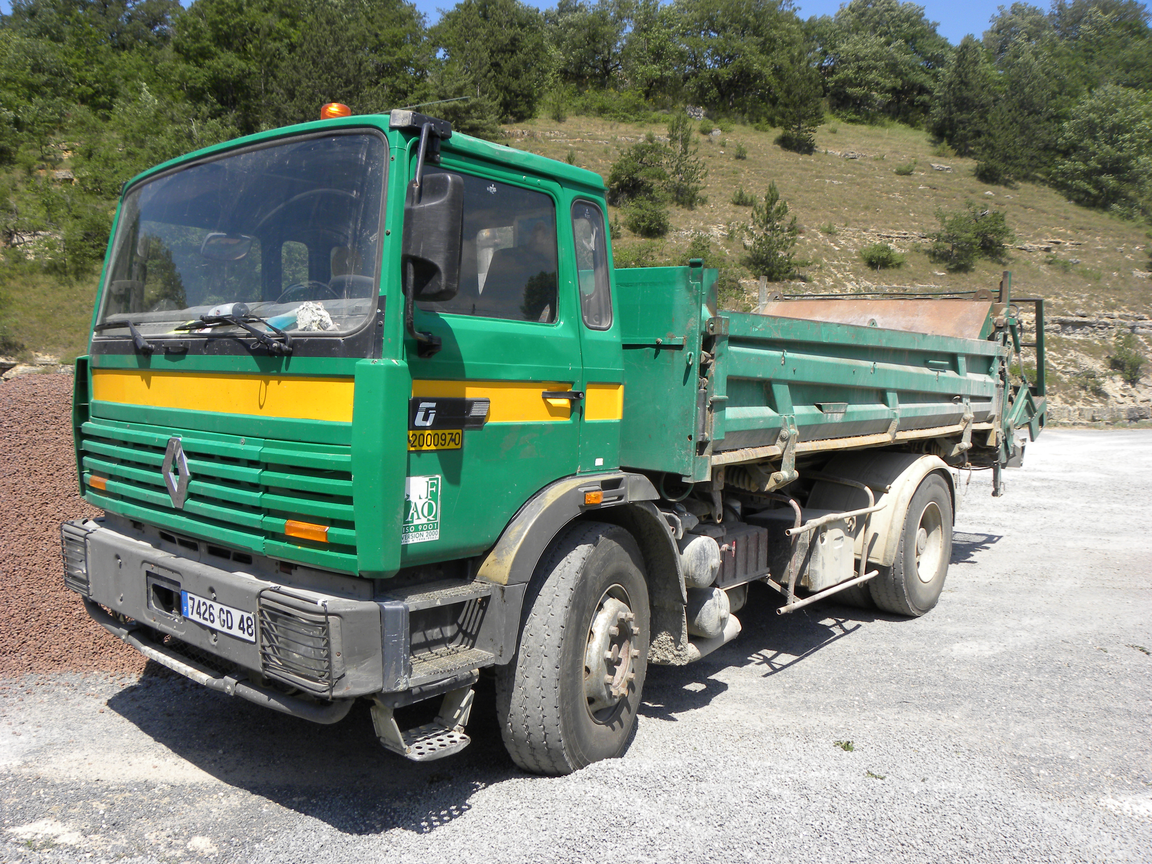 Renault G 9270 truck